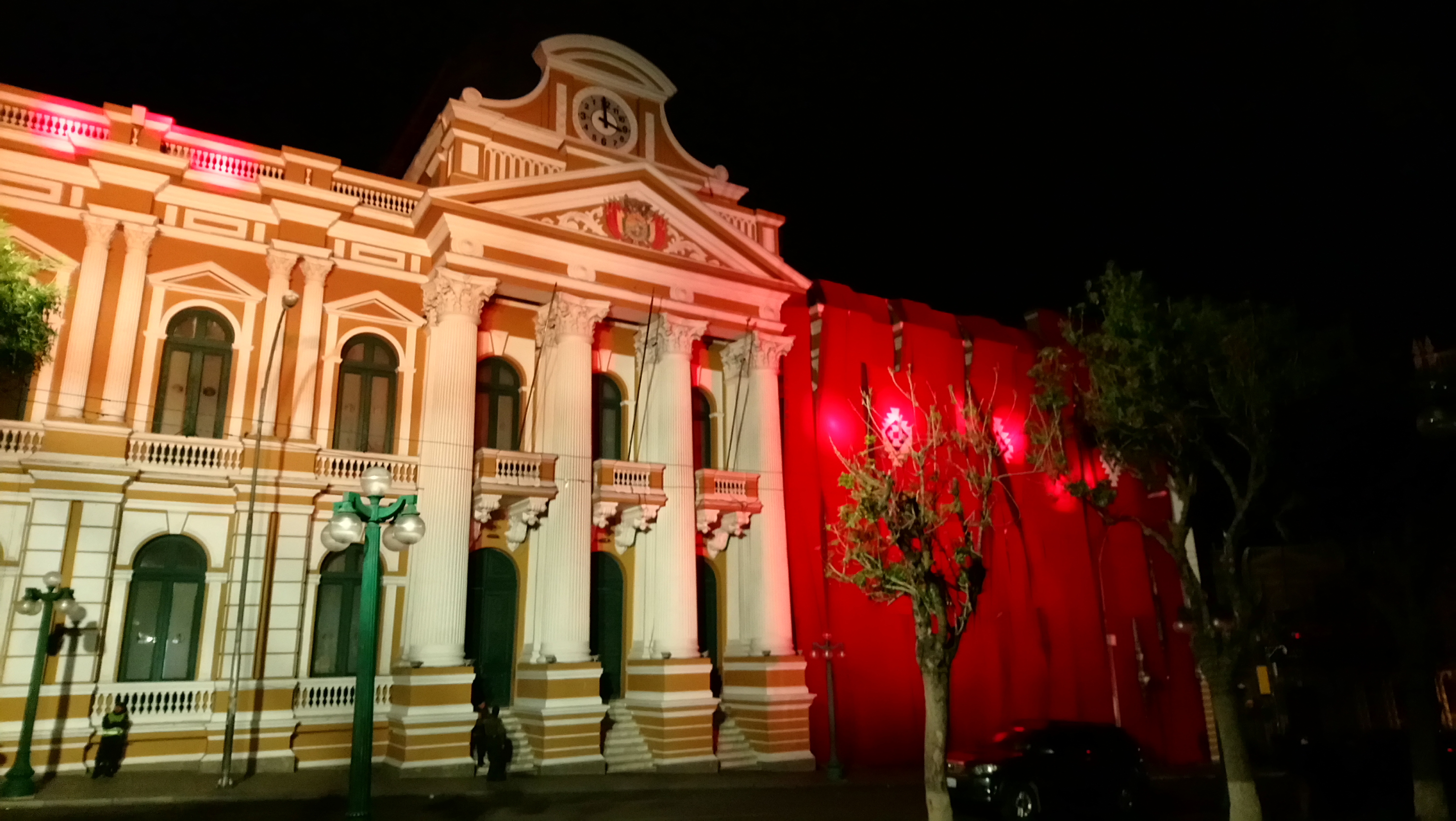 Palacio de gobierno durante el evento de presentación del libro historia de la Revolución de Tupac Katari